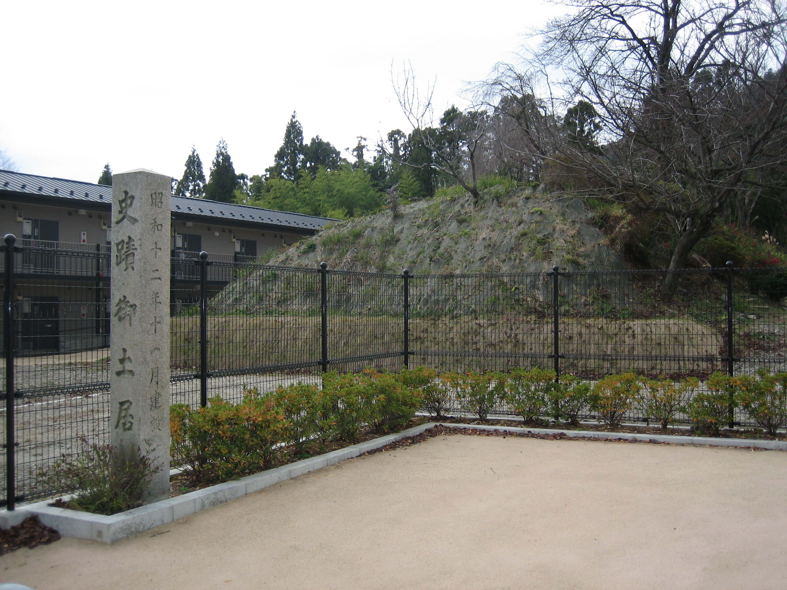 鷹峯御土居を京都市北区鷹峯旧土居町から撮影。